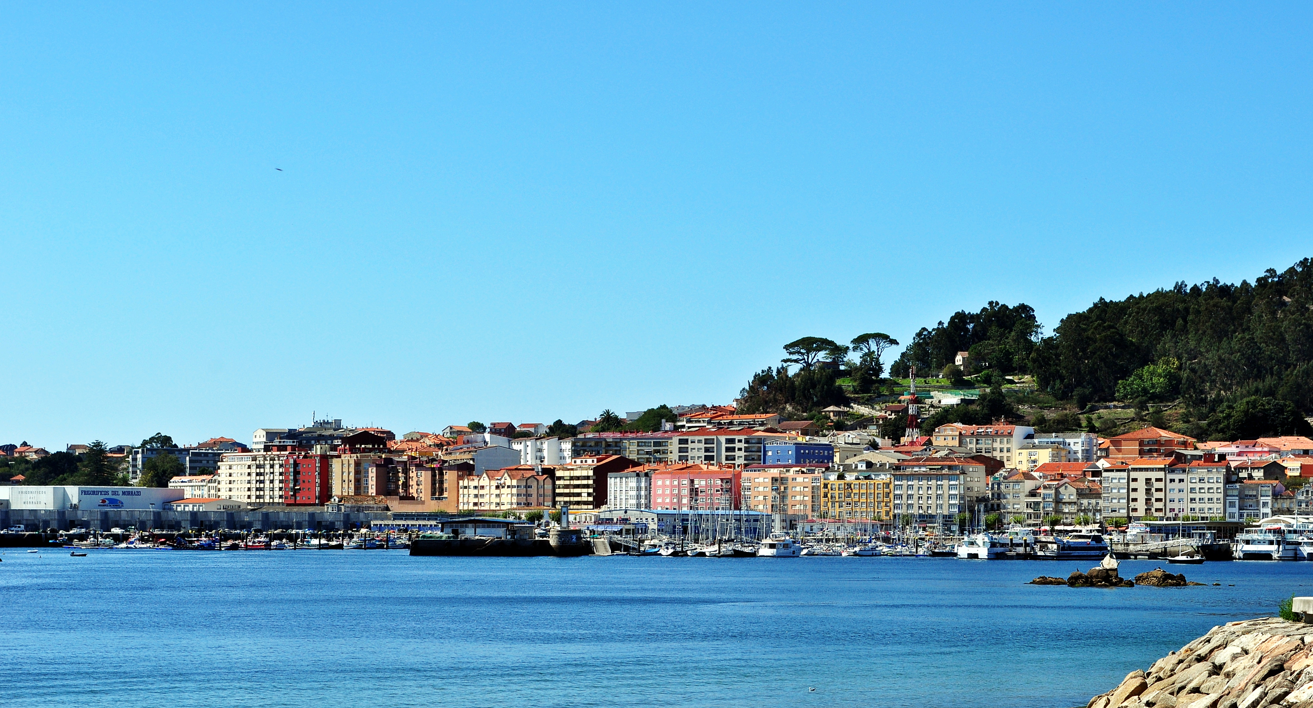 Cangas do Morrazo